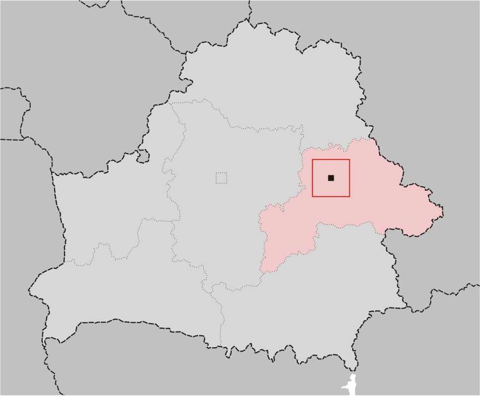 Lage der weißrussischen Stadt Mahiljou